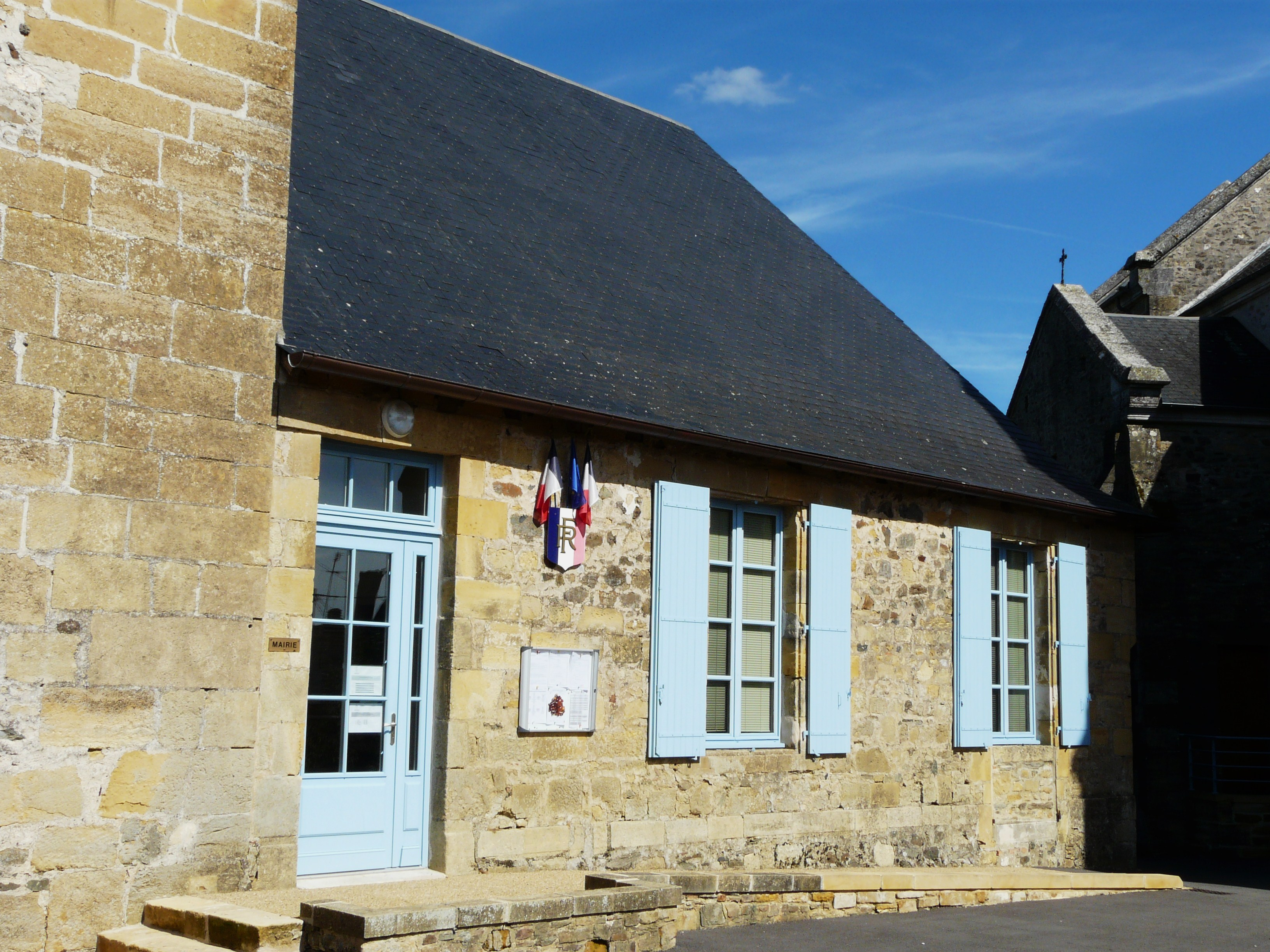 La mairie de Dussac, Dordogne, France.